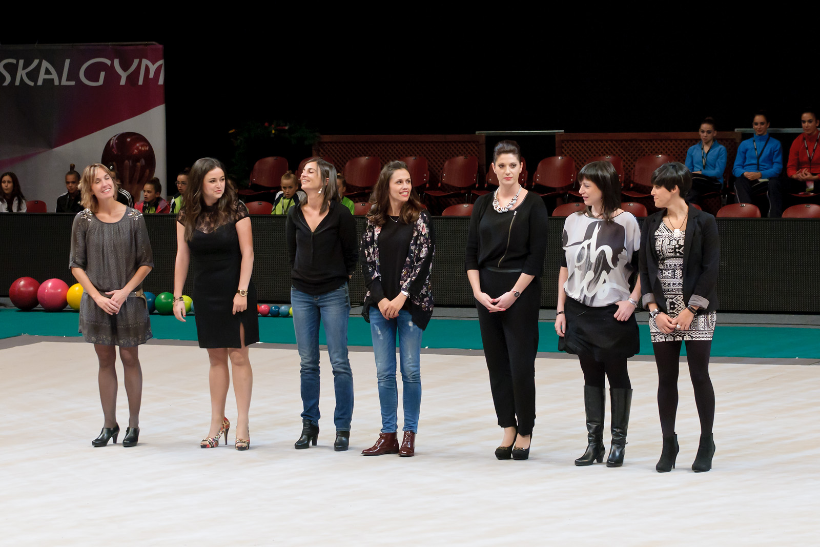 Las Niñas de Oro de Atlanta durante su homenaje en la Gala Euskalgym 2014, celebrada en el pabellón Buesa Arena de Vitoria el 8 de noviembre de 2014.